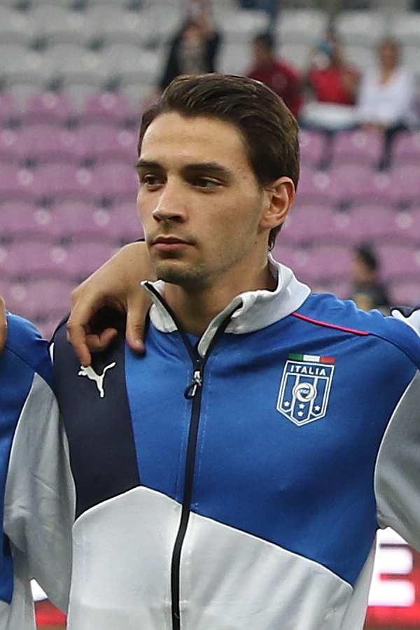 20150616 - Portugal - Italie - Genève - Mattia De Sciglio